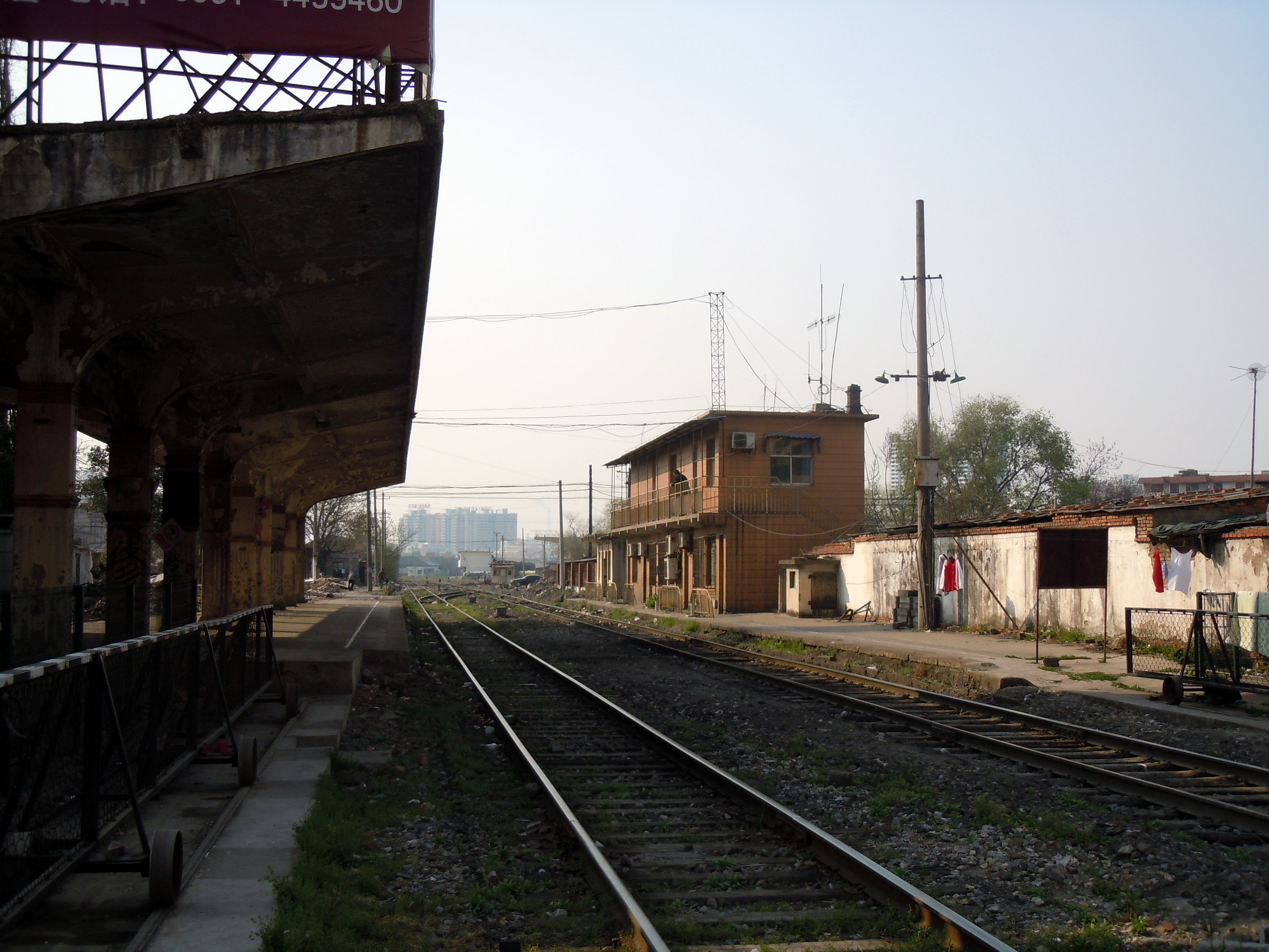 明光路铁路道口